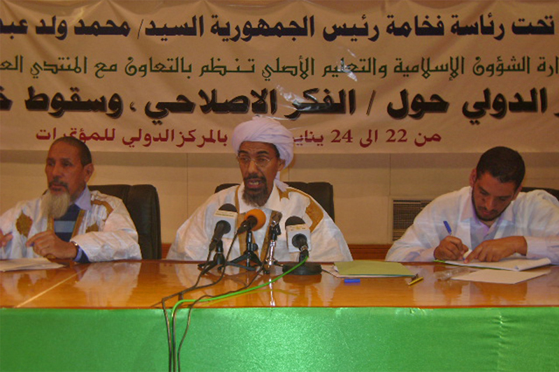 Religious leaders from Mauritania, Egypt, Sudan and other countries discuss in Nouakchott the role of religious moderation in confronting modern challenges. قادة دينيون من موريتانيا ومصر والسودان وبلدان أخرى يناقشون في نواكشوط دور الاعتدال الديني في مواجهة التحديات المعاصرة. Des leaders religieux venus de Mauritanie, d'Egypte, du Soudan et d'autres pays se retrouvent à Nouakchott pour parler du rôle de la modération religieuse face aux défis de la modernité.